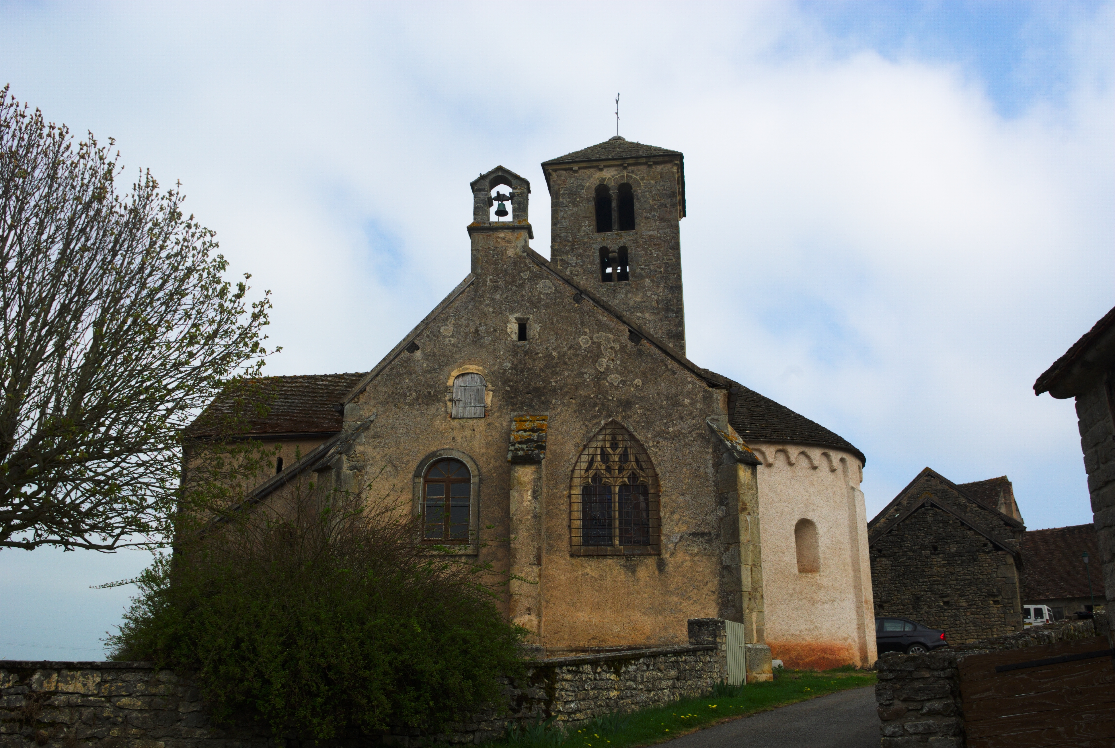 Église Saint-Eusèbe de Saint-Huruge